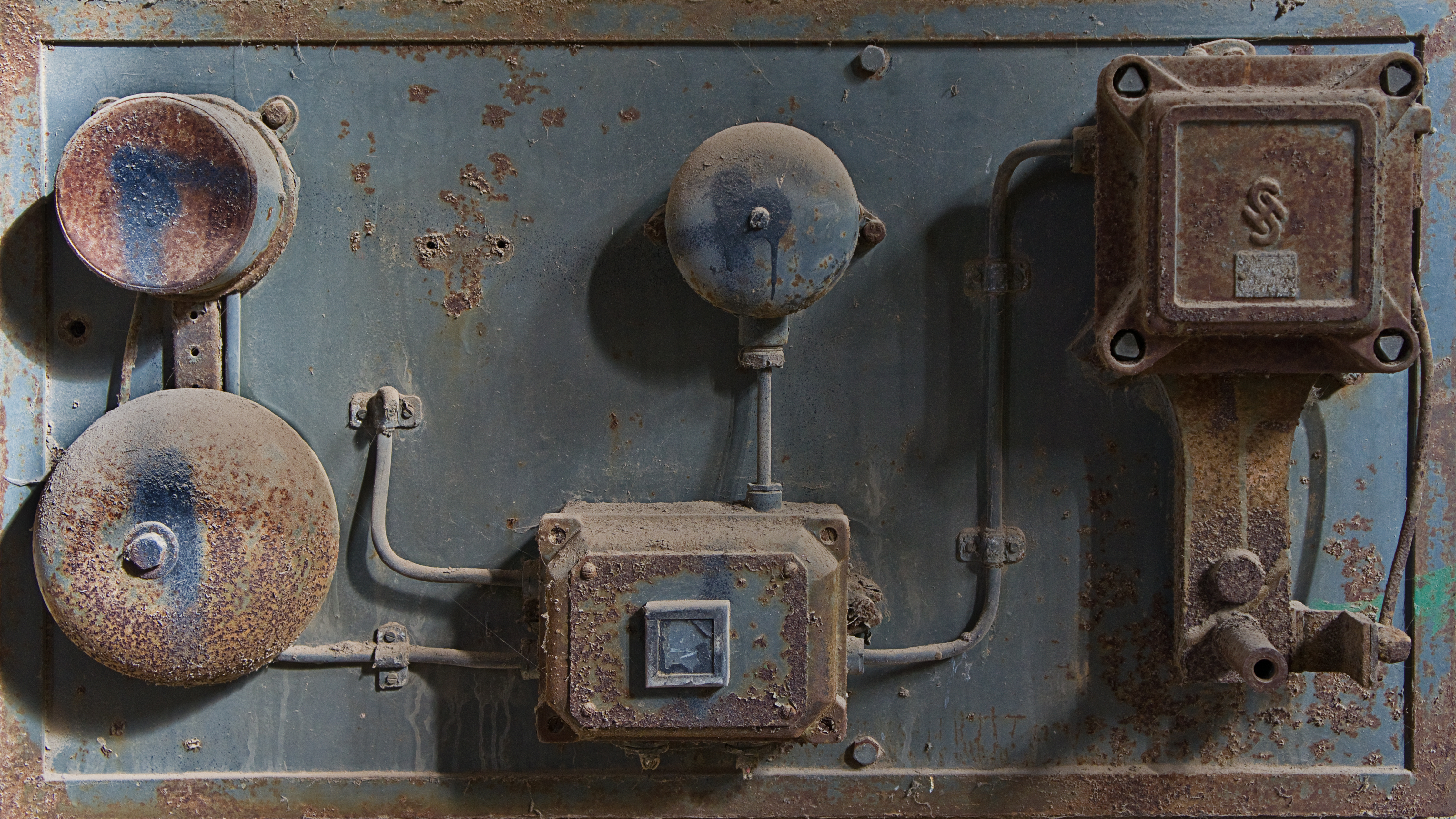 Grube Dr. Geier (Grube Amalienhöhe). Schachtsignalanlage (elektrische Signalglocken) des Straubenschachtes zur Kommunikation zwischen Fördermaschinist (im Nachbargebäude) und Schachtbedienpersonal (Anschläger). Die Signalanlage befand sich im Erdgeschoss (Rasenhängebank-Niveau) an der östlichen Wand, mittig zwischen den beiden östlichen Fördergerüststützen.